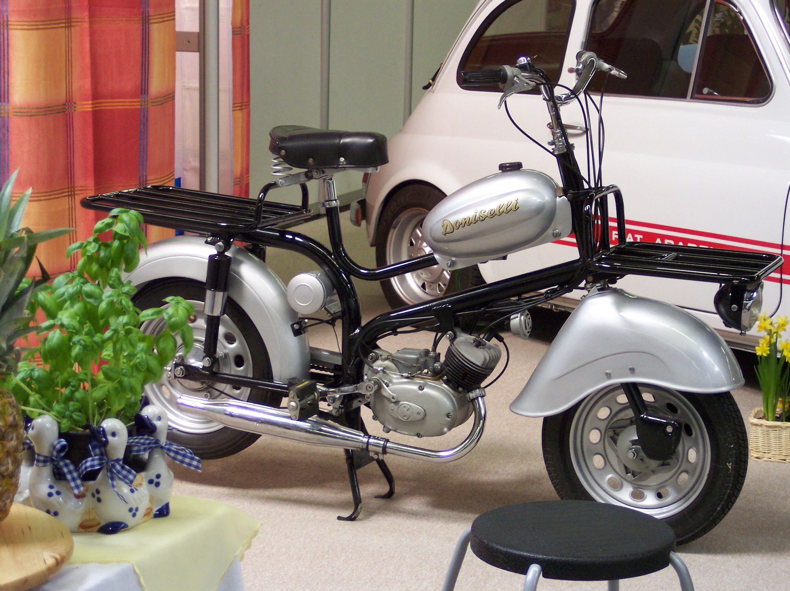 Doniselli Moped